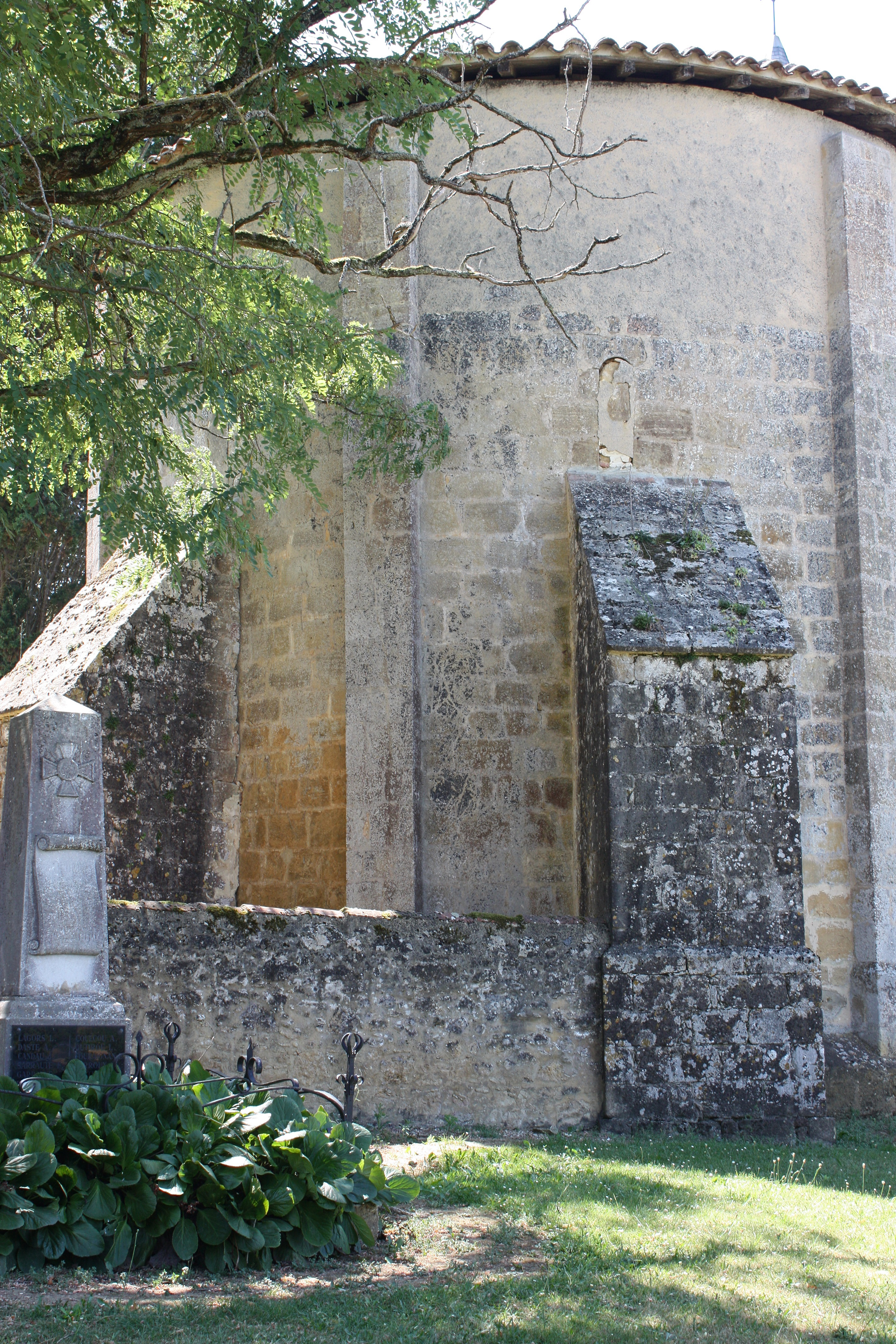 Margouët - Eglise Saint-Jean-Baptiste Abside d'origine romane